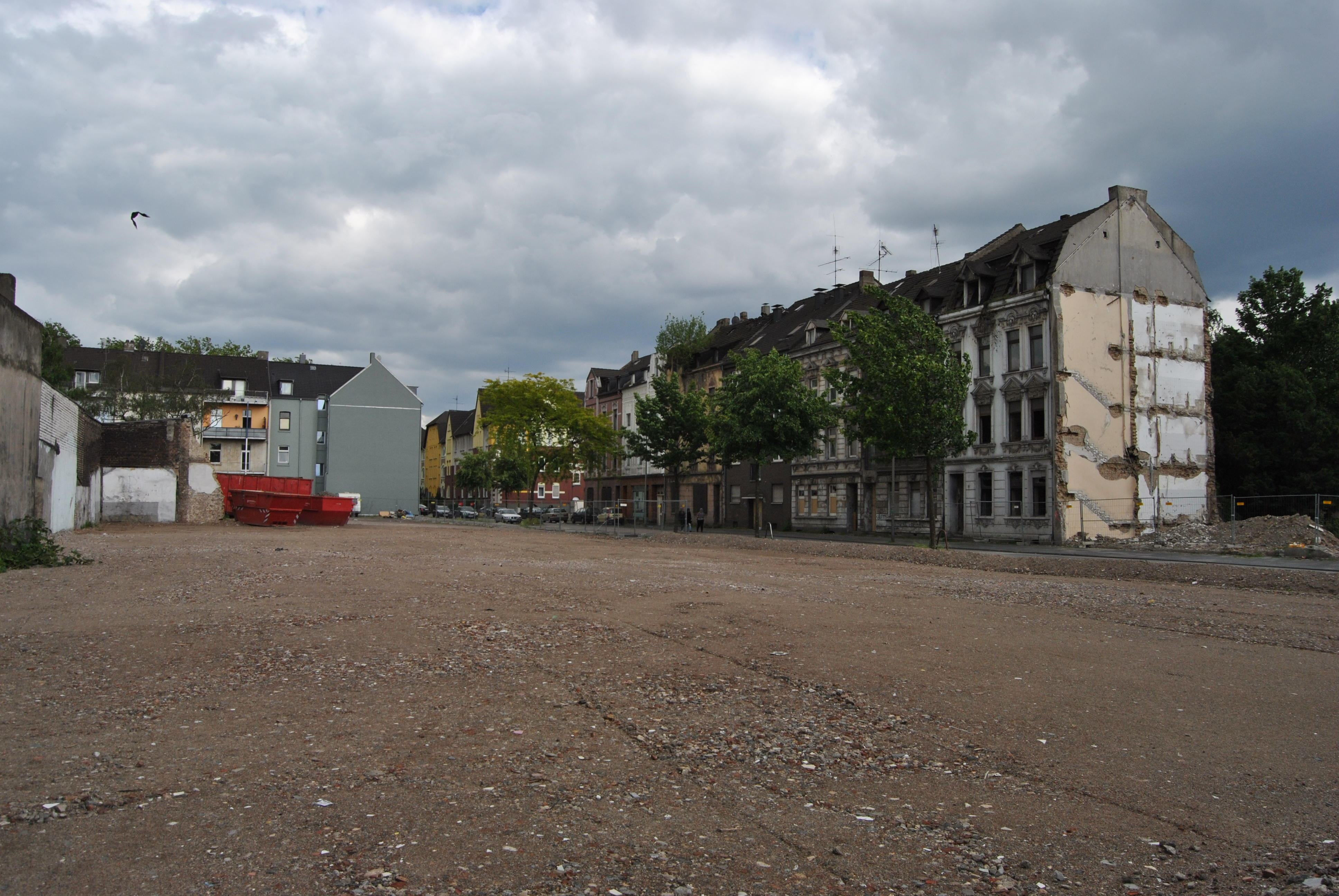 This photograph was taken with a Nikon D3000. Heruntergekommende Häuser im sozialen Brennpunkt Bruckhausen, einem Stadtteil von Duisburg, das größtenteils für den Grüngürtel Duisburg-Nord abgerissen wird und noch weiterhin werden soll